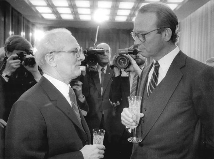 ADN-Zentralbild Mittelstädt-6.2.1984-lie Berlin: Neujahrsempfang im Amtssitz des Staatsrates am 12.1.1984. Der Generalsekretär des ZK der SED und Vorsitzende des Staatsrates der DDR, Erich Honecker, im Gespräch mit dem Leiter der Ständigen Vertretung der Bundesrepublik Deutschland, Dr. Hans Otto Bräutigam.